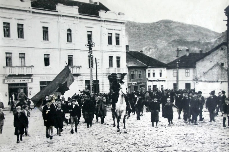 Srpskohrvatski / српскохрватски: Ulazak Užičkog partizanskog odreda, na čelu sa komandantom Dušanom Jerkovićem, u oslobođeno Užice 24. septembra 1941.